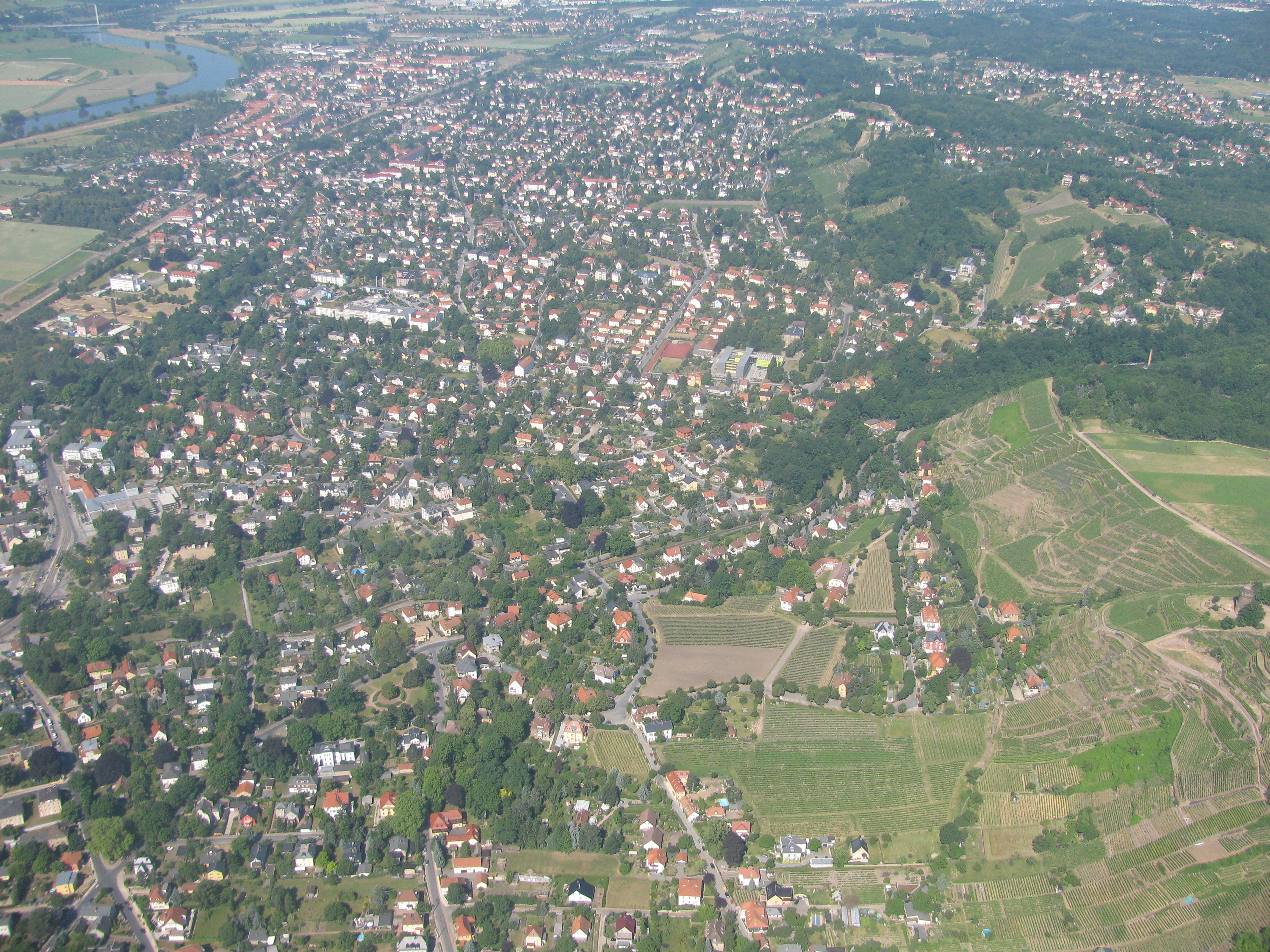 Luftbild Radebeul-West